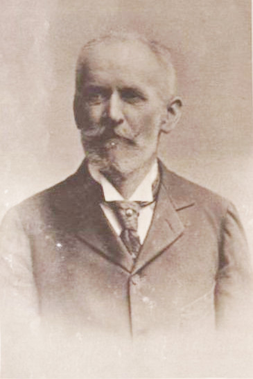 Karl von Czyhlarz, Hochschulprofessor in Graz